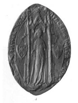 Catherine of Courtenay